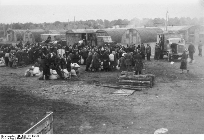 Ankunft von Flüchtlingen aus Ostpr[eußen] in Schleswig-Holstein (Bahnhof Meldorf).